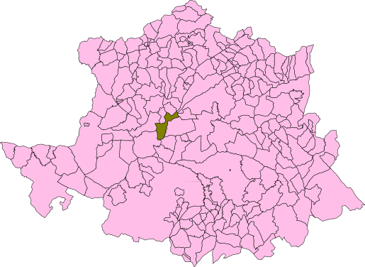 Cañaveral